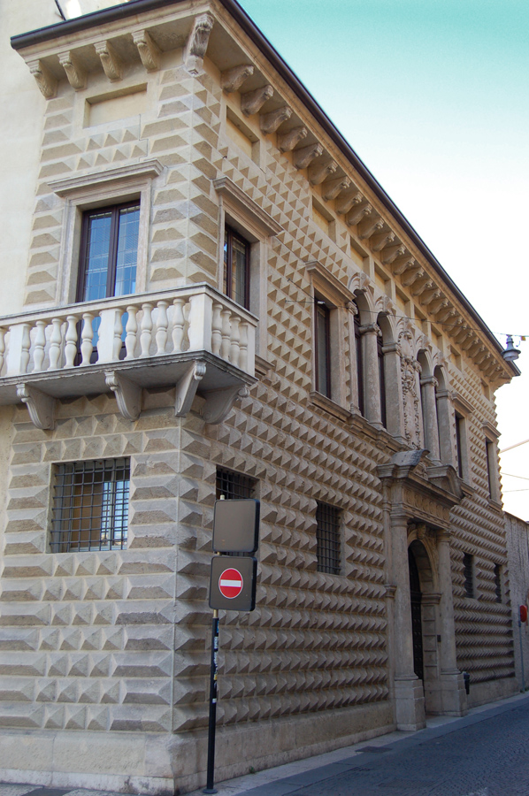 Fotografia del palazzo Diamanti a Verona